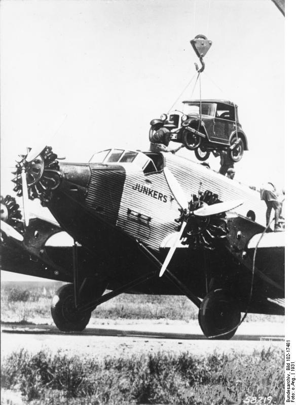 Ein Junkers-Fracht-Flugzeug als Transportmittel auf Neu-Guinea! Verfrachten eines Autos in ein Junkers-Fracht-Flugzeug für den Transport in das schwer zugängliche Gebiet von Inner-Neu-Guinea. 1931